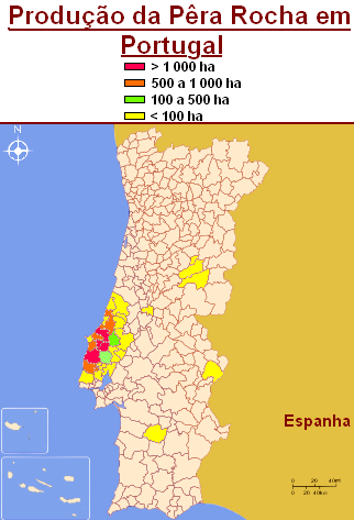 Mapa Portugal Pera Rocha